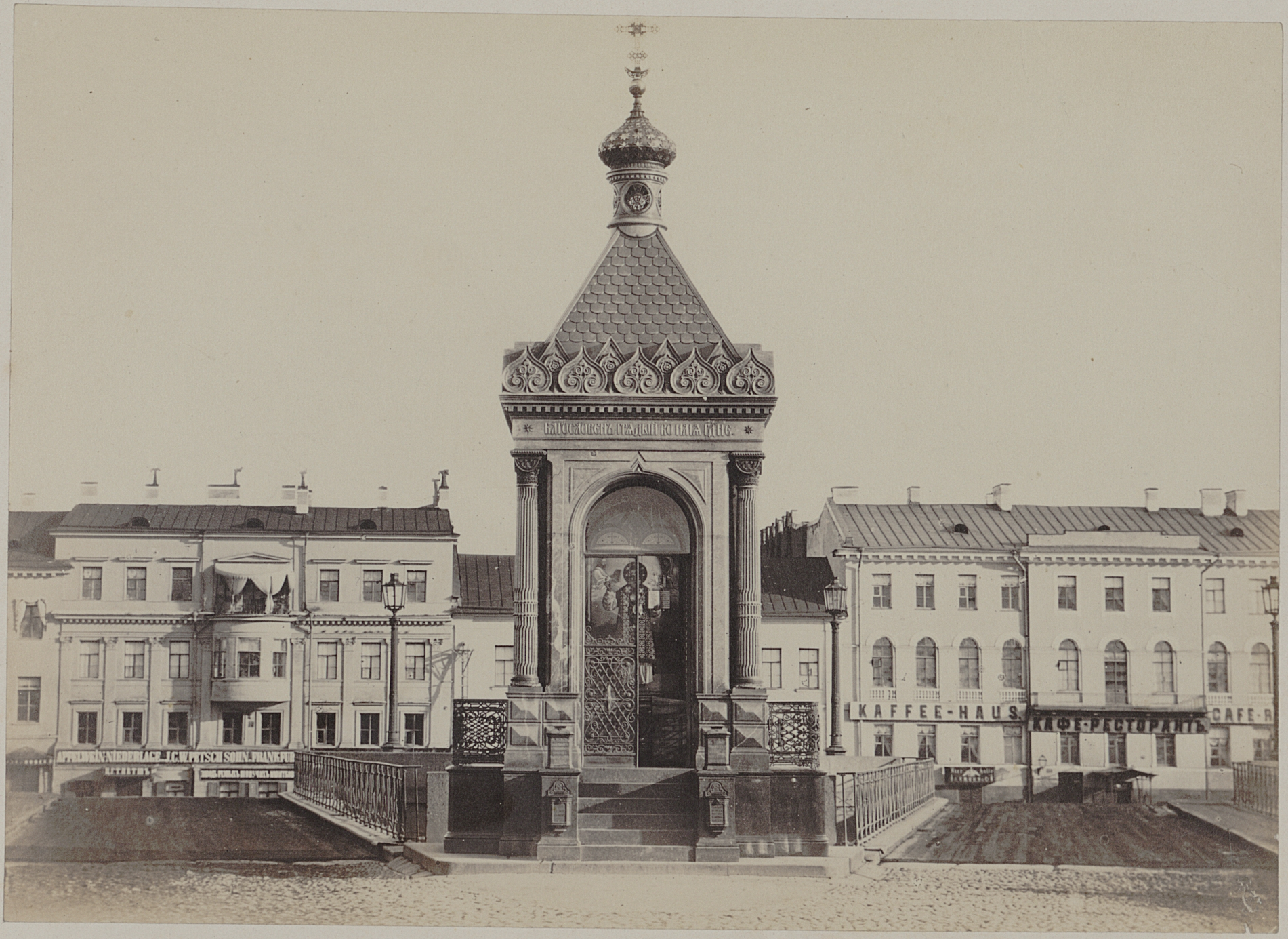 Часовня св. Николая Чудотворца на Николаевском мосту.